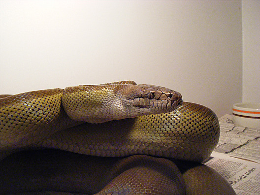 PYTHON